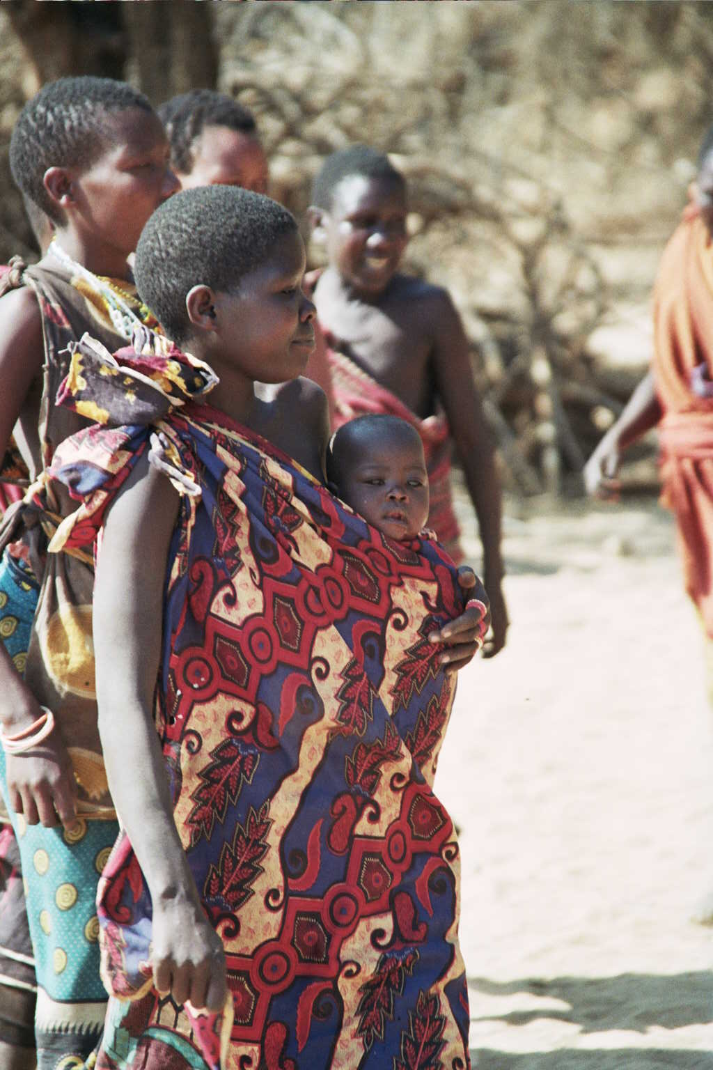 Hadzabe woman